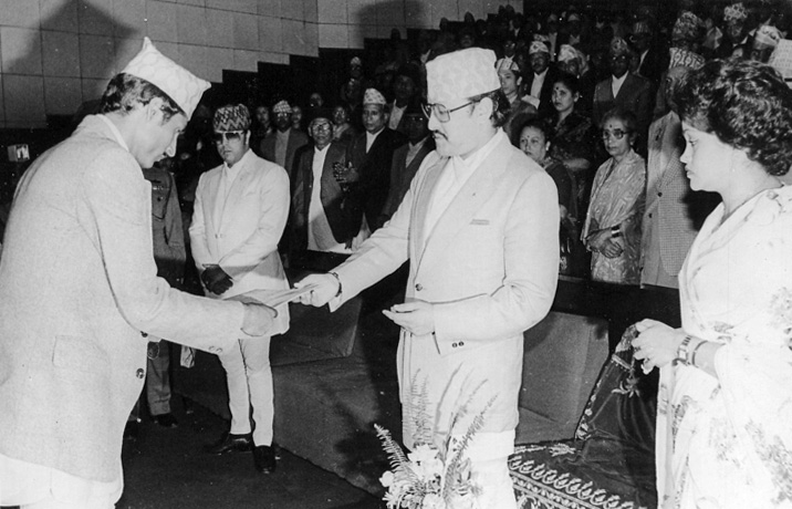 नेपाली: राजा वीरेन्द्रबाट कविता महोत्सव २०४० को प्रथम पुरस्कार ग्रहण गर्दै, असार २०४०